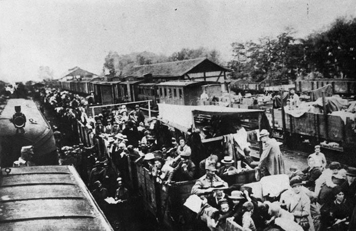 Menekülők vonata Brassónál 1916. augusztus végén.